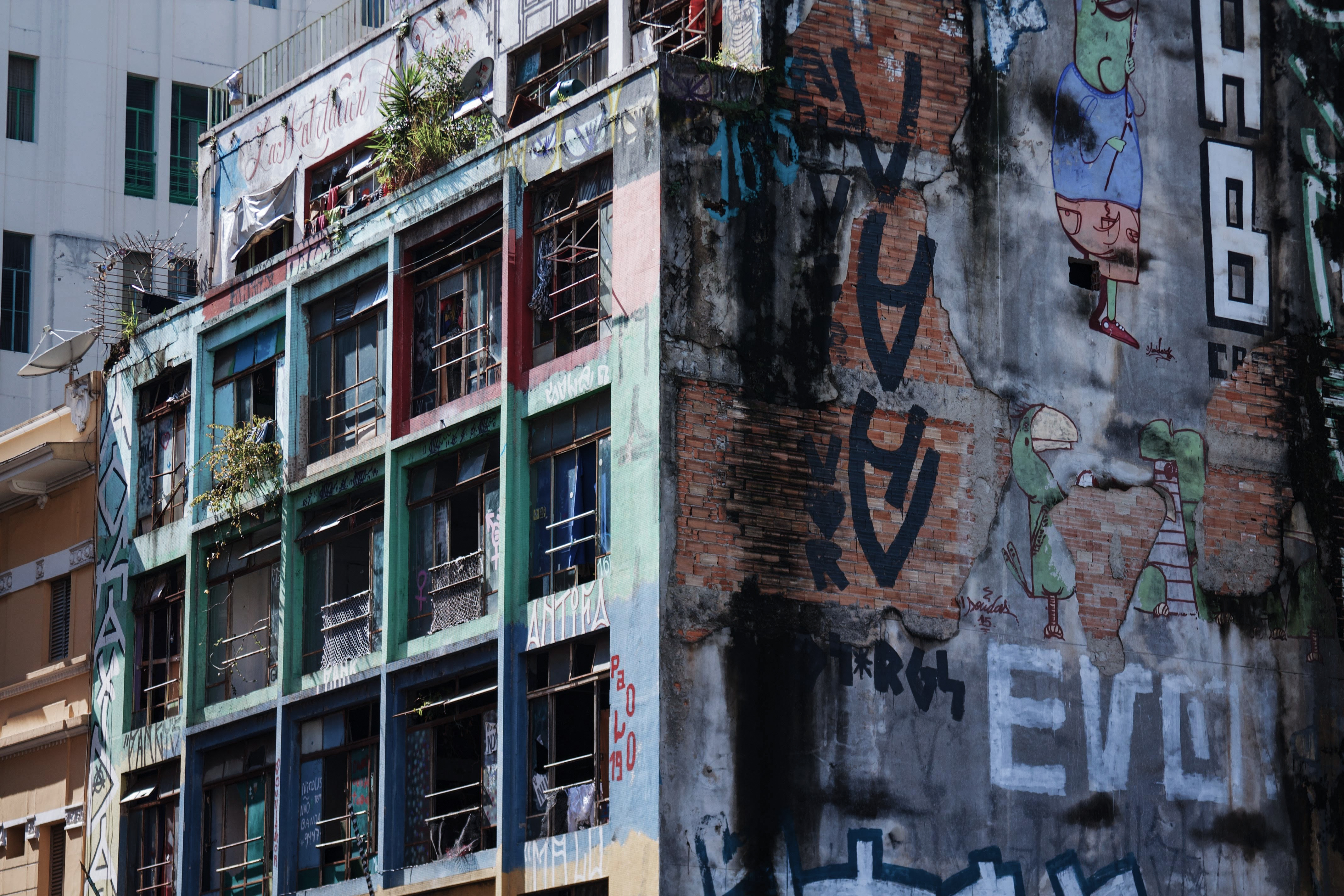 Prédio invadido no centro de São Paulo